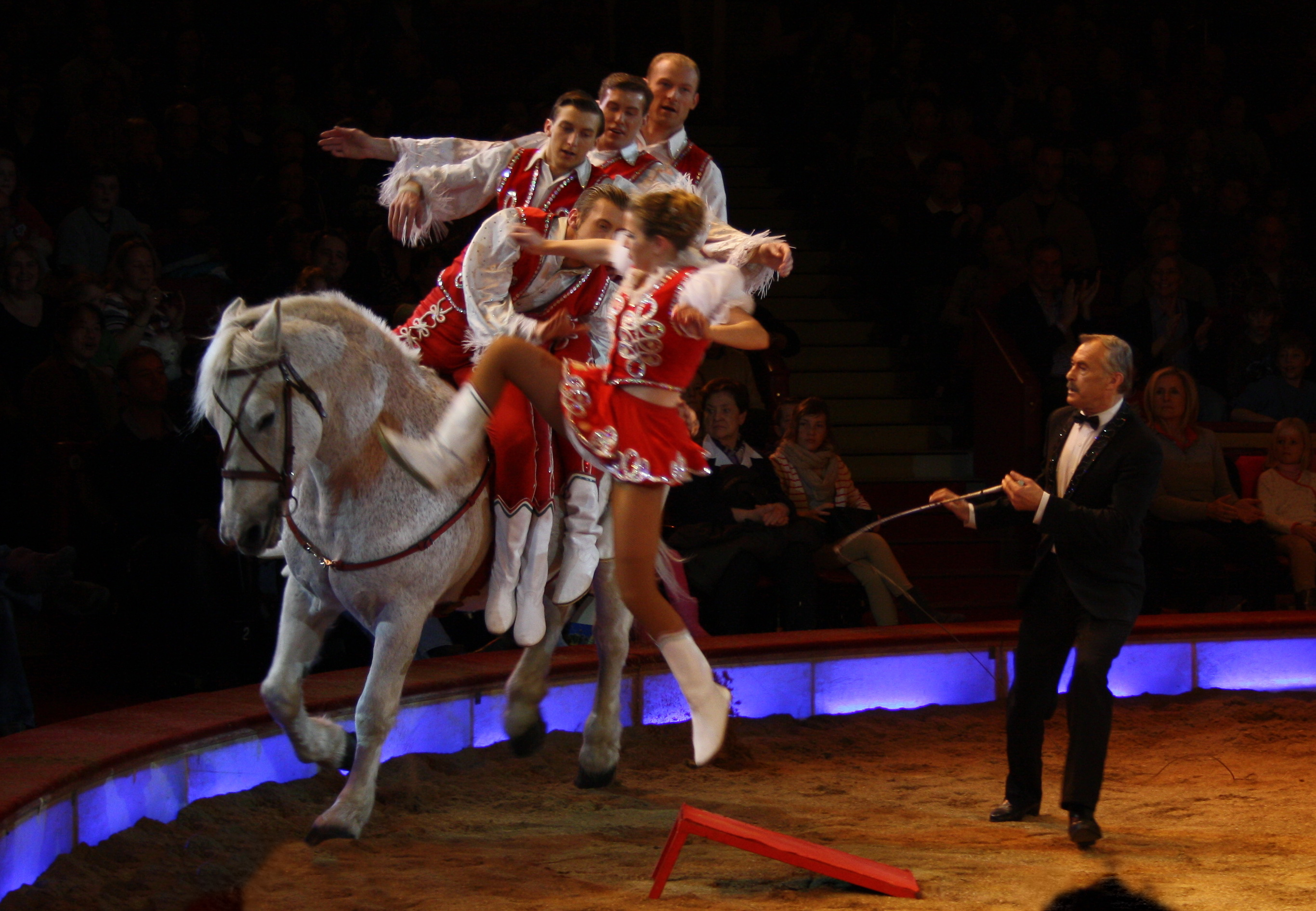 Familie Donnert aus Ungarn. Akrobatik auf dem Pferd.